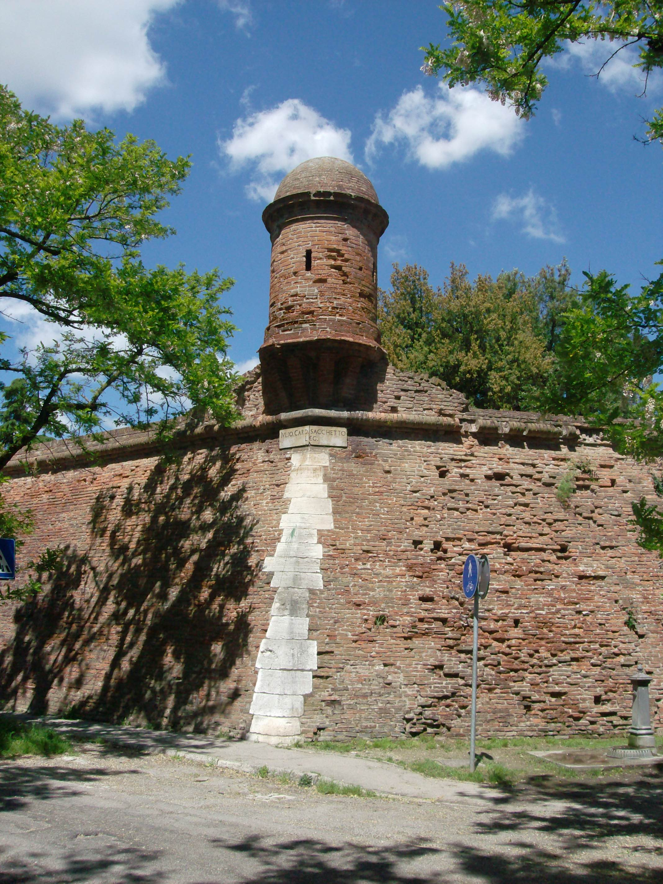 Garitta di vedetta settecentesca nel Baluardo di S. Giorgio all'imbocco di via Marco Polo